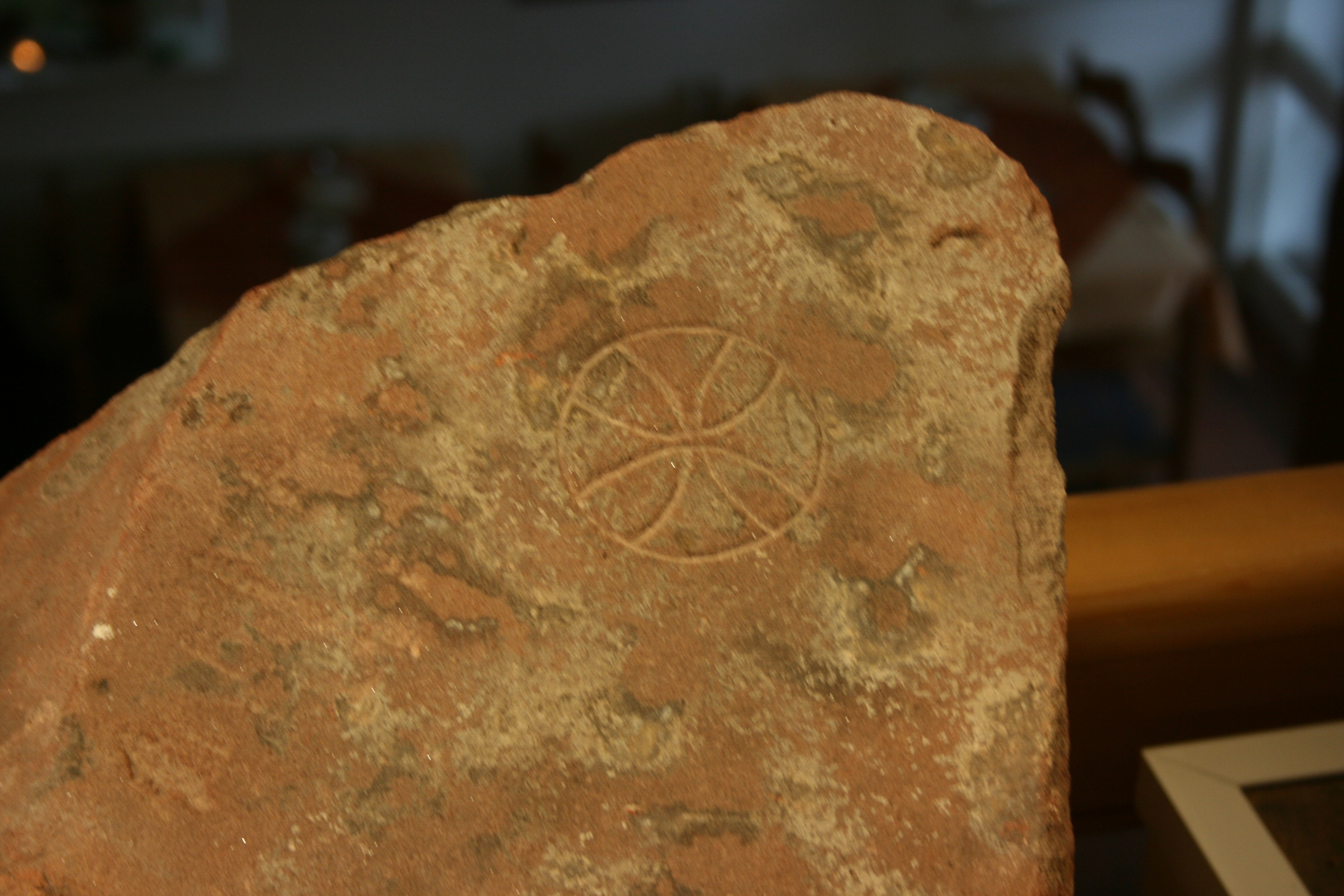 Kloster Ihlow- Fragment einer Altarplatte. Ausschnitt